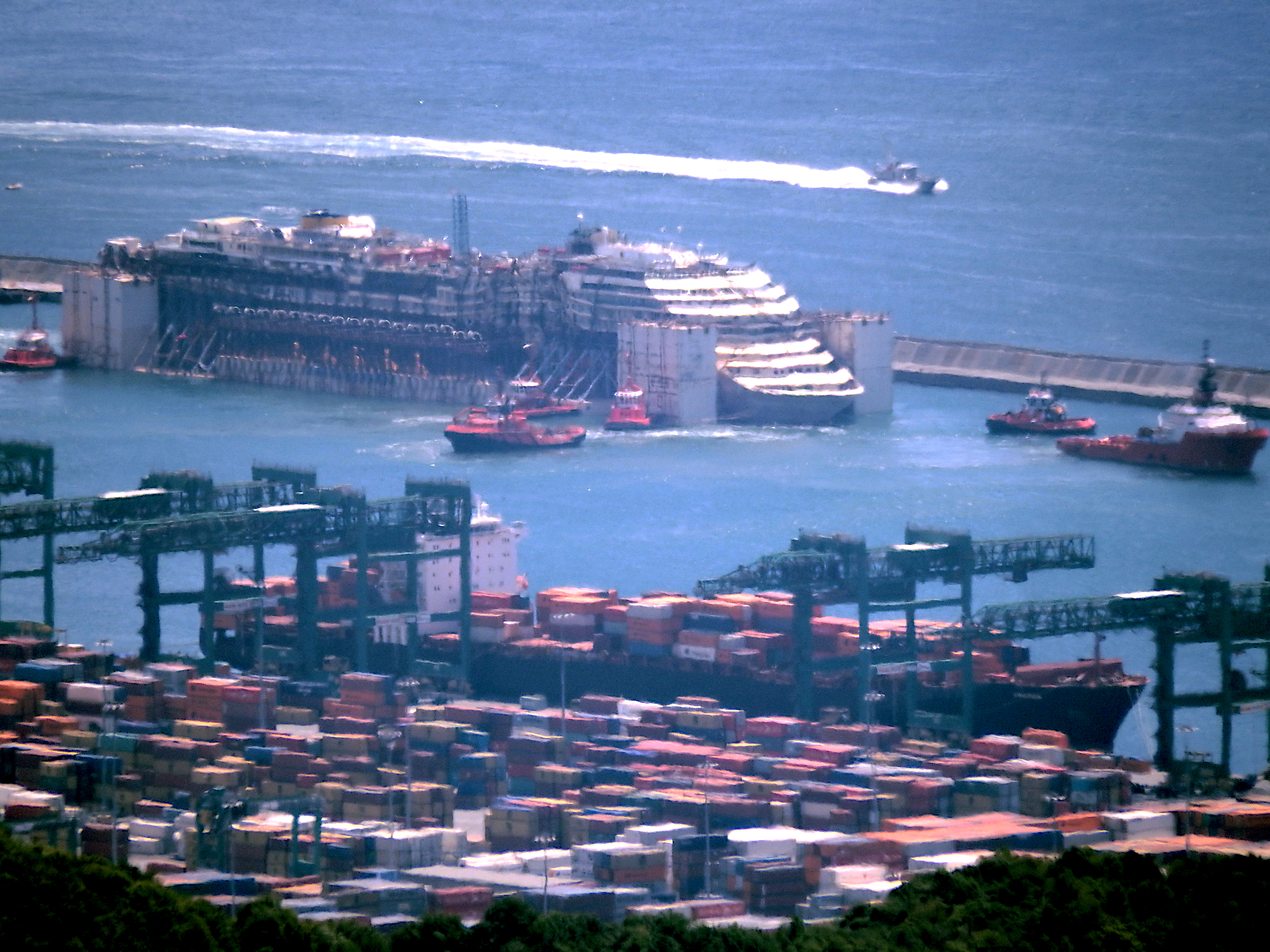 Conclusione dell'operazione di traino del relitto della Costa Concordia, ripresa dal Forte Geremia, il 27 Luglio 2014